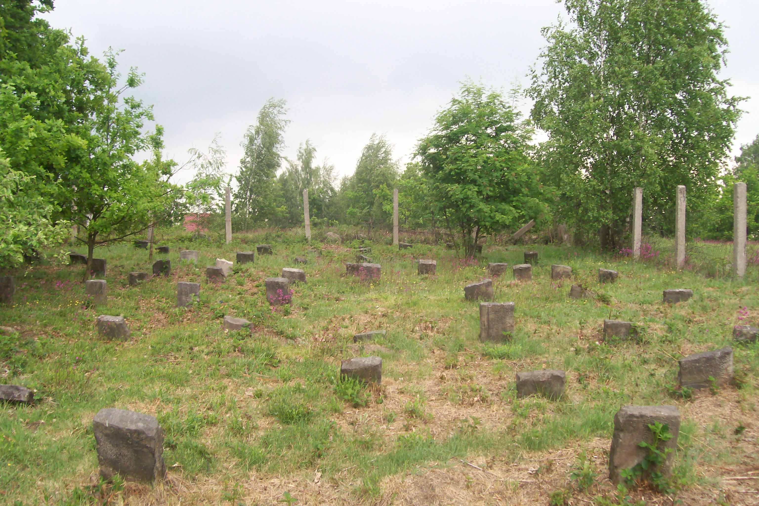 Cmentarz żydowski w Sierpcu